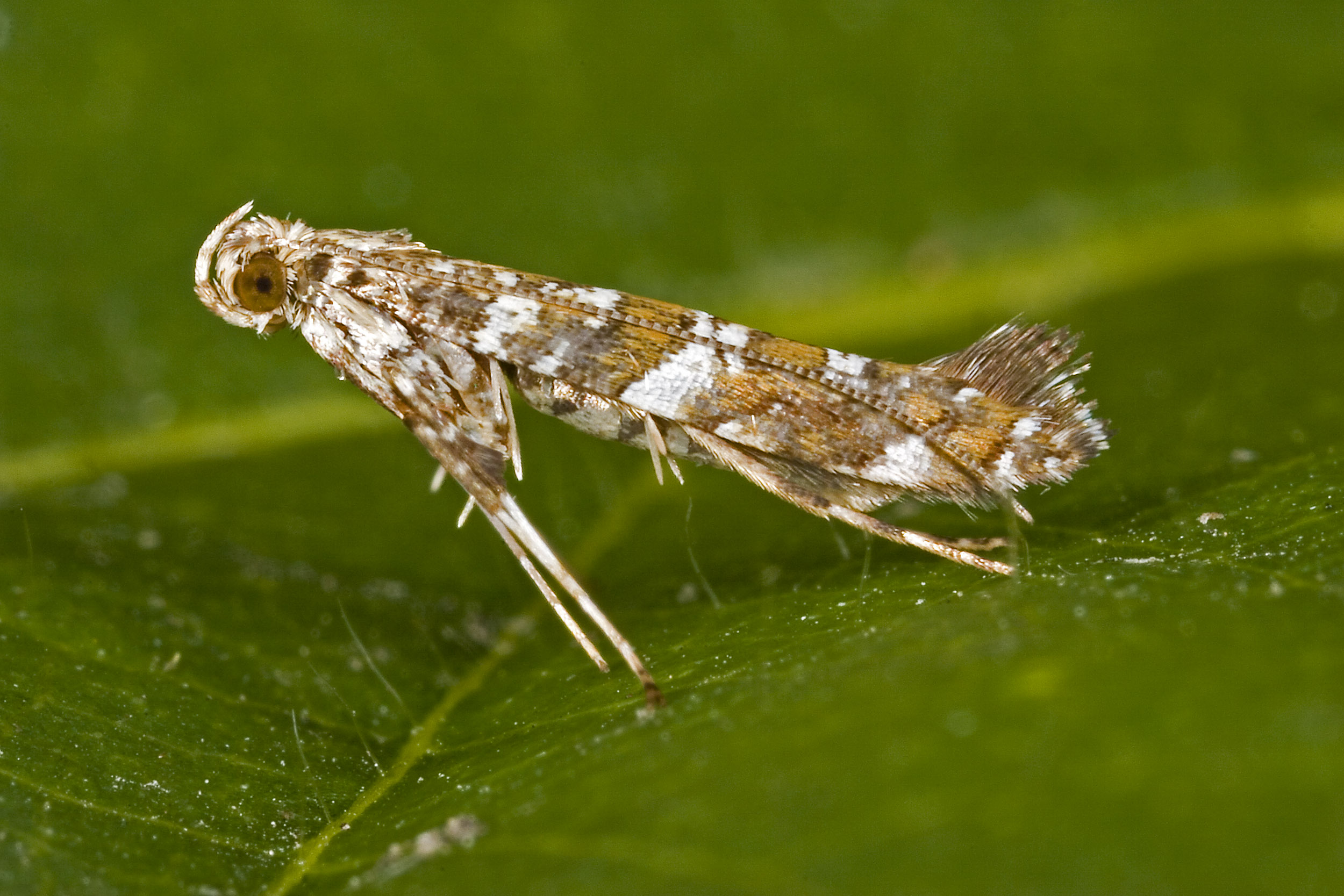 Gracillaria syringella (Fabricius, 1794)